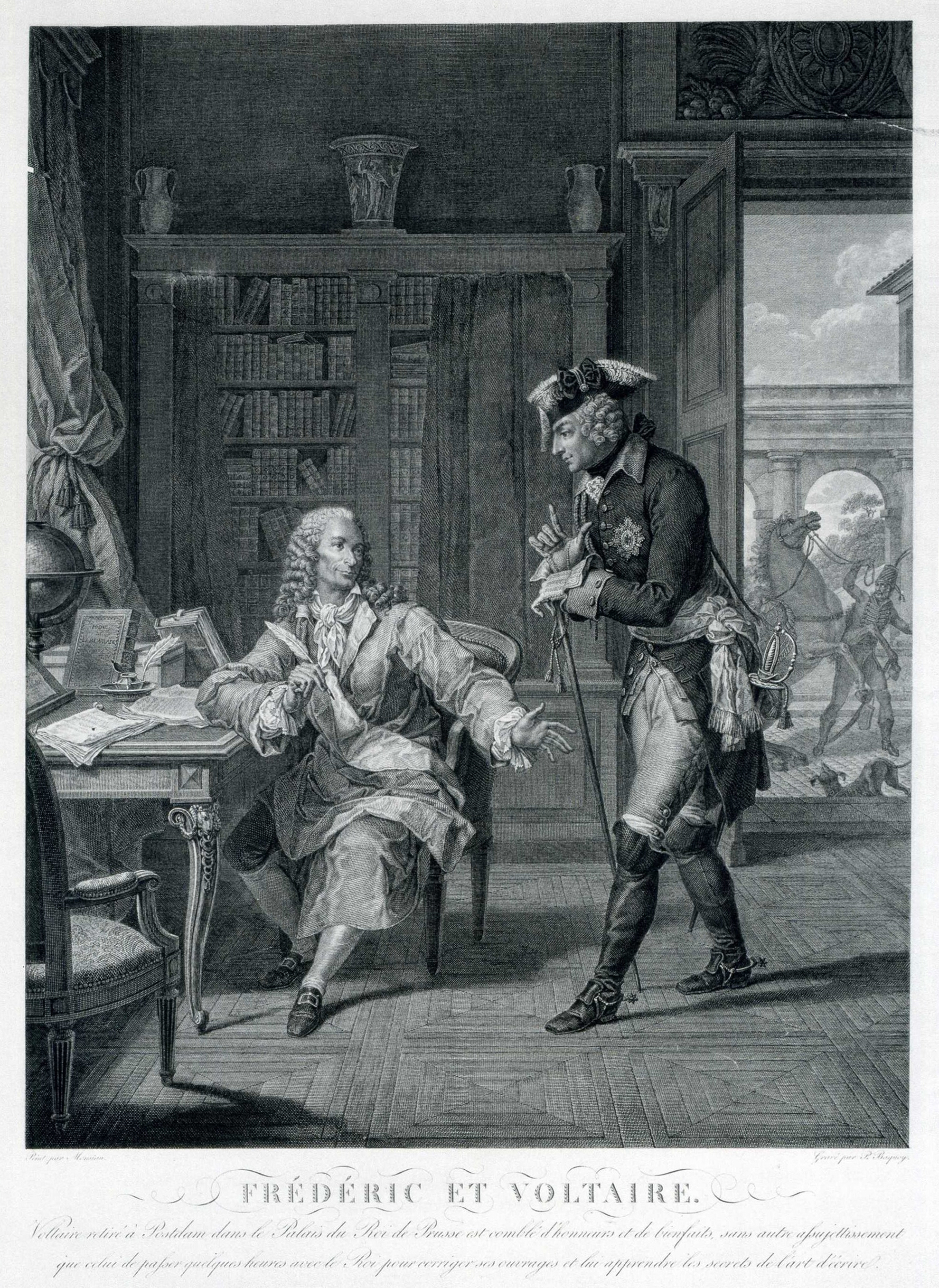 Friedrich II. von Preußen und Voltaire. Kupferstich. Stiftung Preußische Schlösser und Gärten, GK II (10) 1413